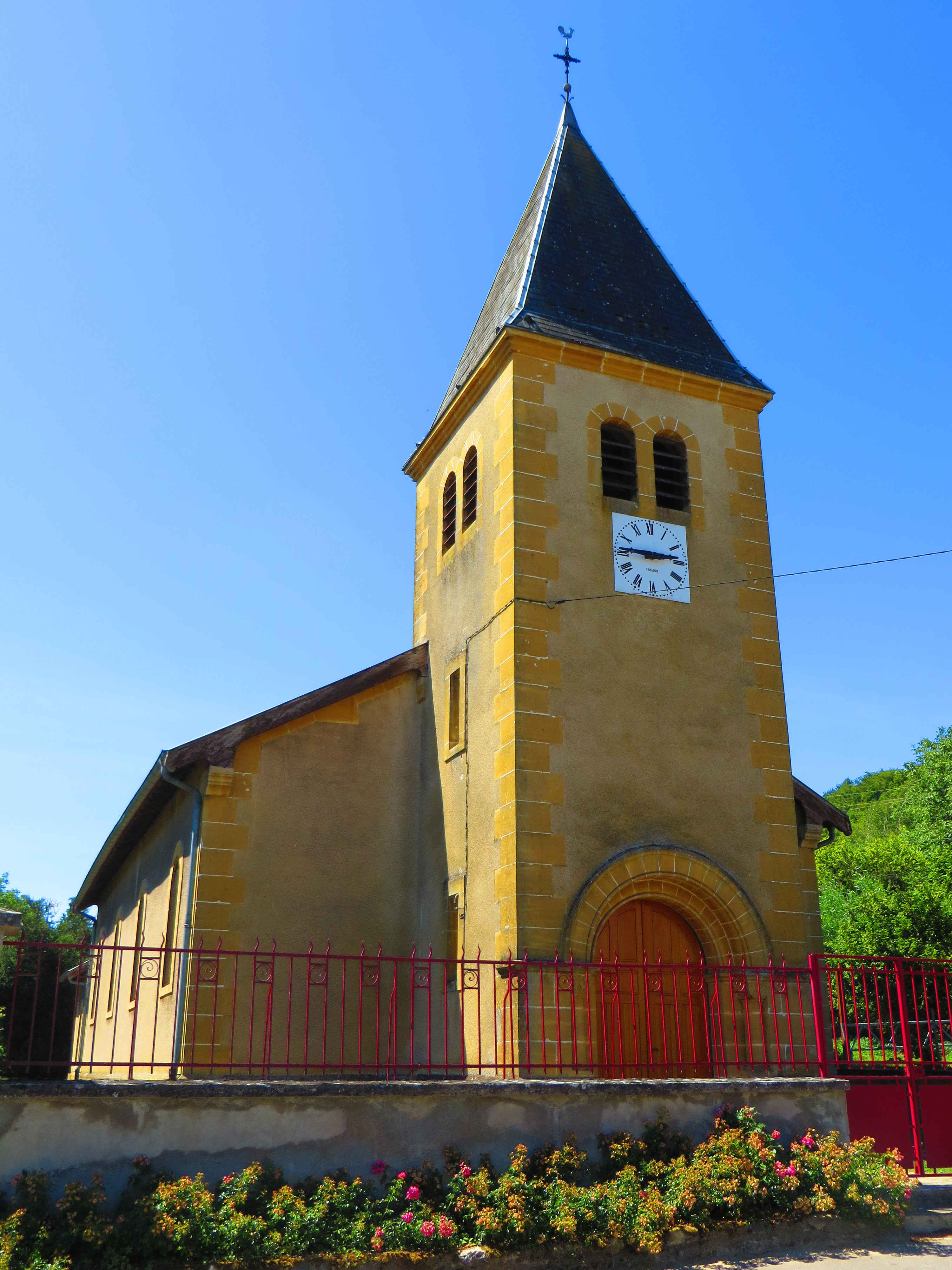 Moulainville L'église Saint-Pierre-ès-Liens